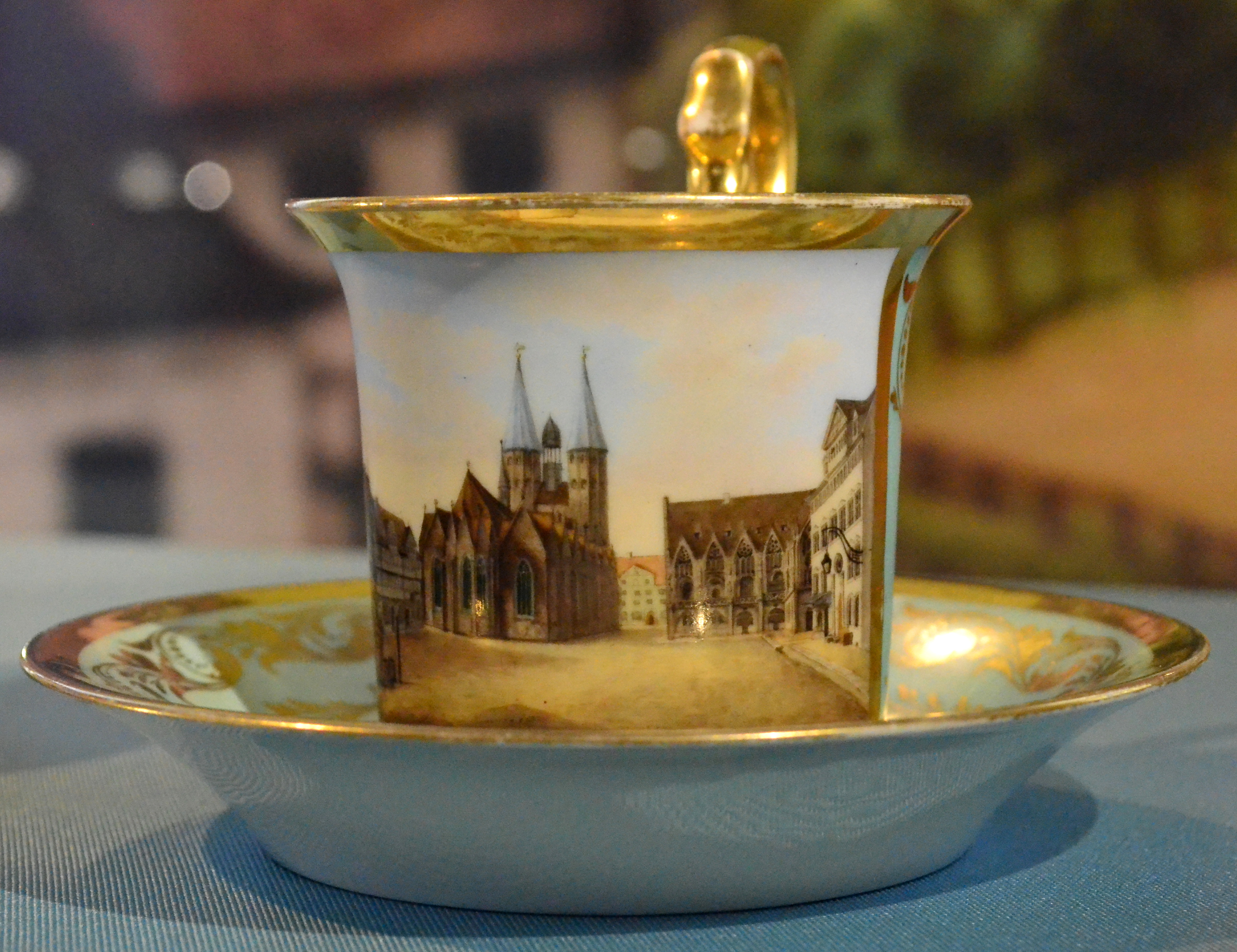 Tasse und Untertasse der Porzellanmanufaktur Fürstenberg von ca. 1830 mit dem Altstadtmarkt in Braunschweig. Zu sehen sind v.l.n.r.: der Altstadtmarktbrunnen, das Gewandhaus, die Martinikirche, das Altstadtrathaus und das Stechinelli-Haus.